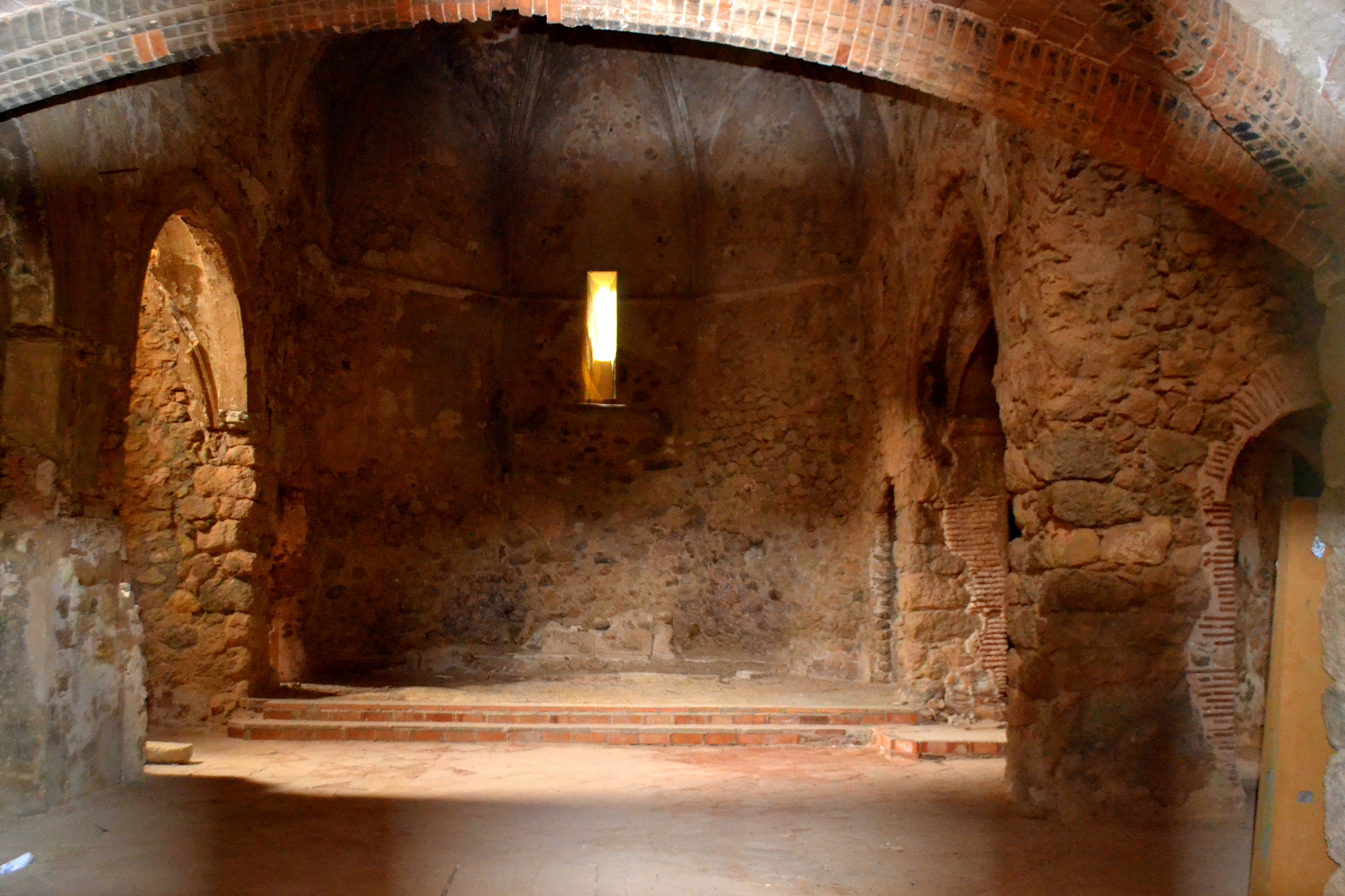 Església nova de Sant Miquel (el Montmell)